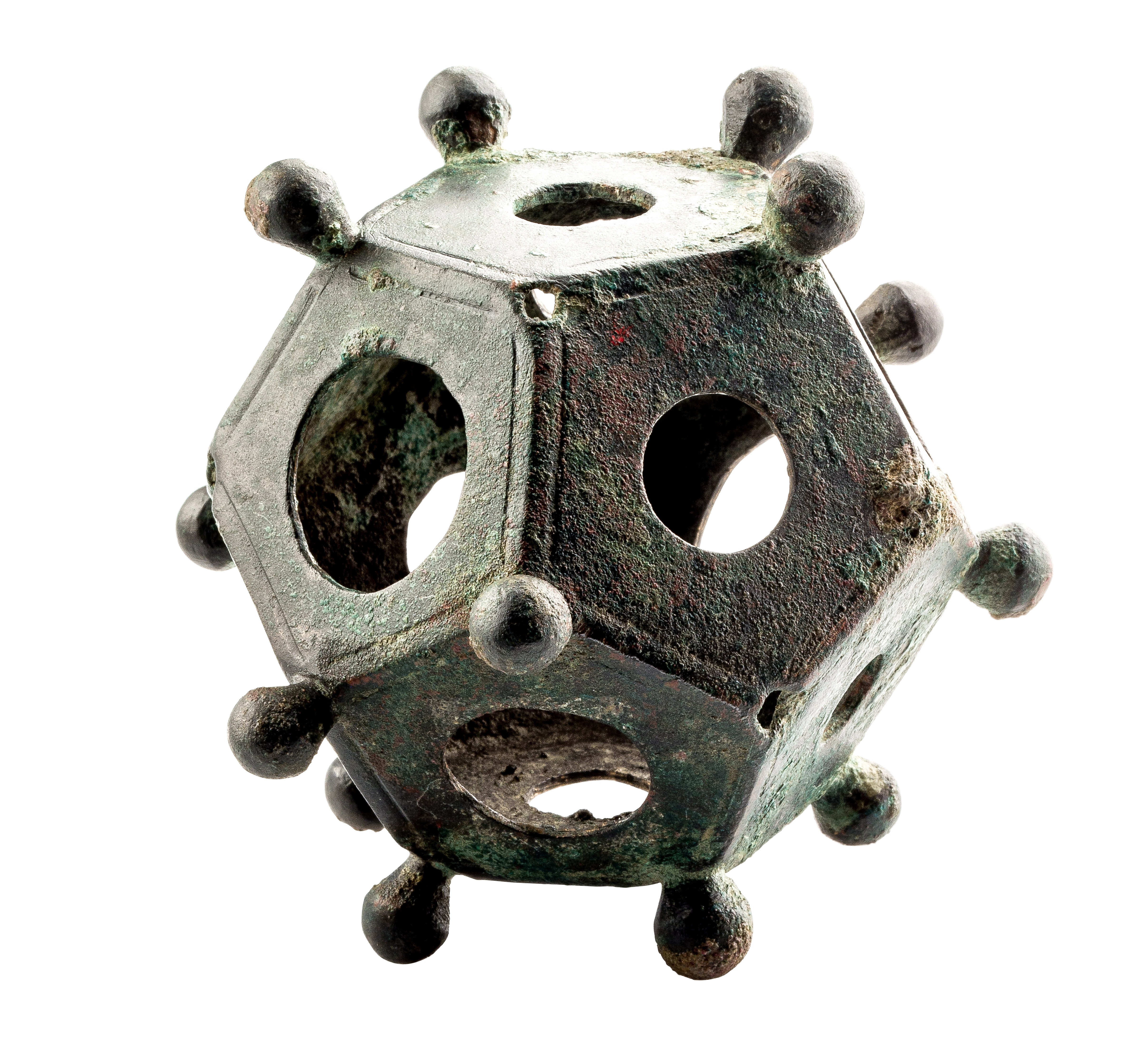 Pentagon-dodecaëder in brons, 150 tot 400 NC, vindplaats: Tongeren, Leopoldwal, 1939, collectie Gallo-Romeins Museum Tongeren, 4002